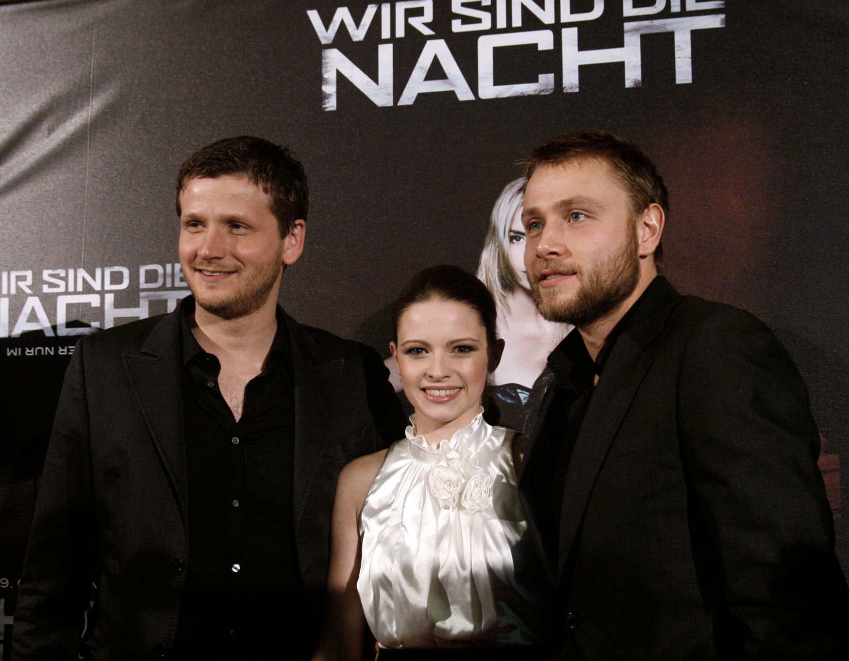 Dennis Gansel, Jennifer Ulrich und Max Riemelt bei der Österreichpremiere von Wir sind die Nacht im Apollo Kino in Wien.